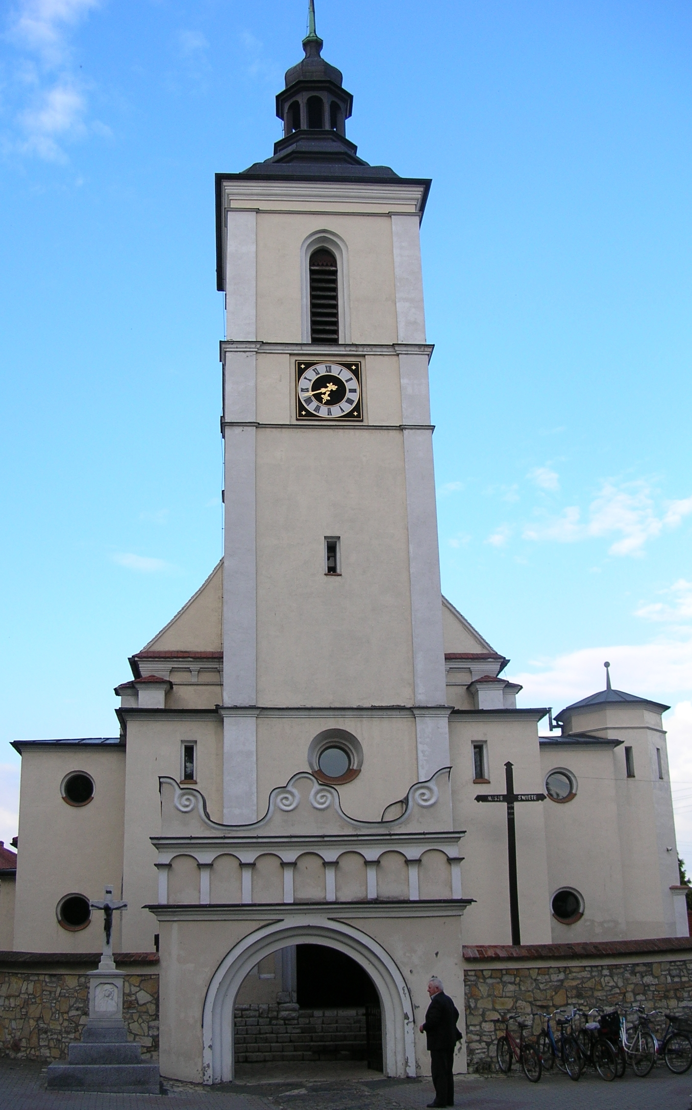 Kujawy - kościół parafialny p.w. Św. Trójcy (zabytek nr 398/58 z 1.07.1958; 558/59 z 24.02.1959; 842/64 z 07.05.1964)